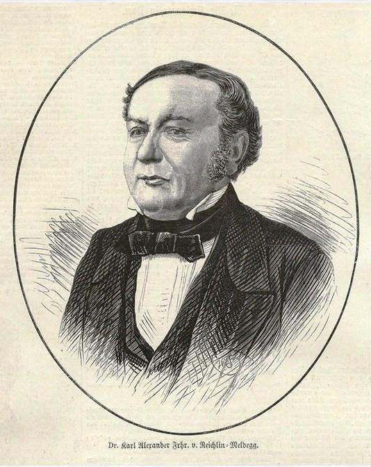 Portrait des Karl Alexander von Reichlin-Meldegg (1801–1877), deutscher Philosoph, Theologe und Hochschullehrer.